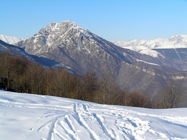 Resegone (autore marco lambruschi). Monte Resegone in una suggestiva immagine invernale ripreso da Forcella (frazione di Costa Valle Imagna) il 5 gennaio 2006.